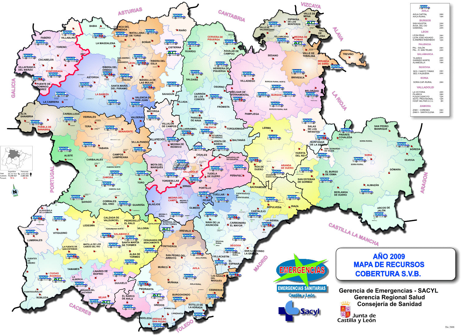 Mapa de la distribución territorial de las unidades de soporte vital básico del Sacyl-112.